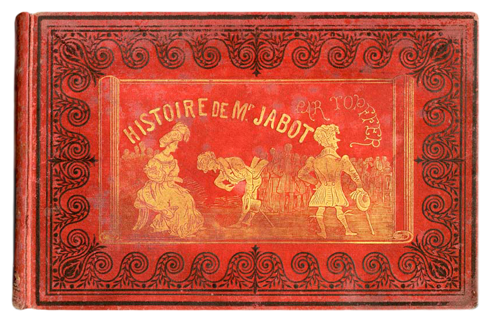 Couverture de l'album Histoire de monsieur Jabot